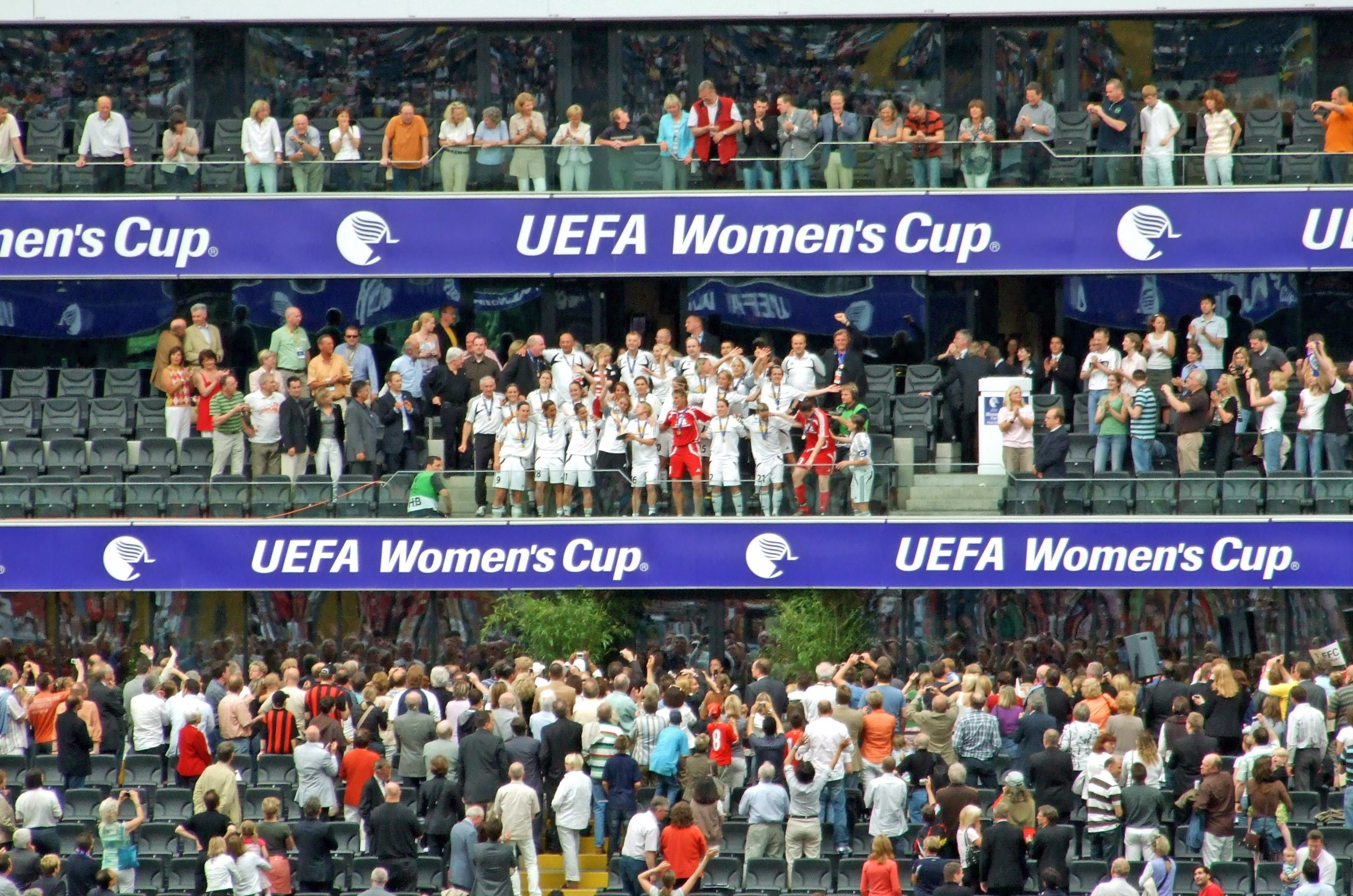 Mannschaften des 1. FFC Frankfurt mit dem Pokal auf der Haupttribuene, Commerzbank-Arena nach dem UEFA-Women's-Cup 2007/2008, Finalrückspiel zwischen 1. FFC Frankfurt und Umeå IK damfotboll